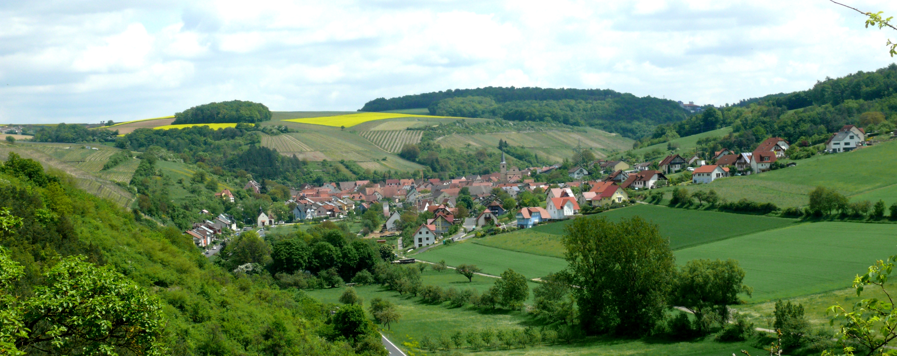 Blick nach Retzstadt